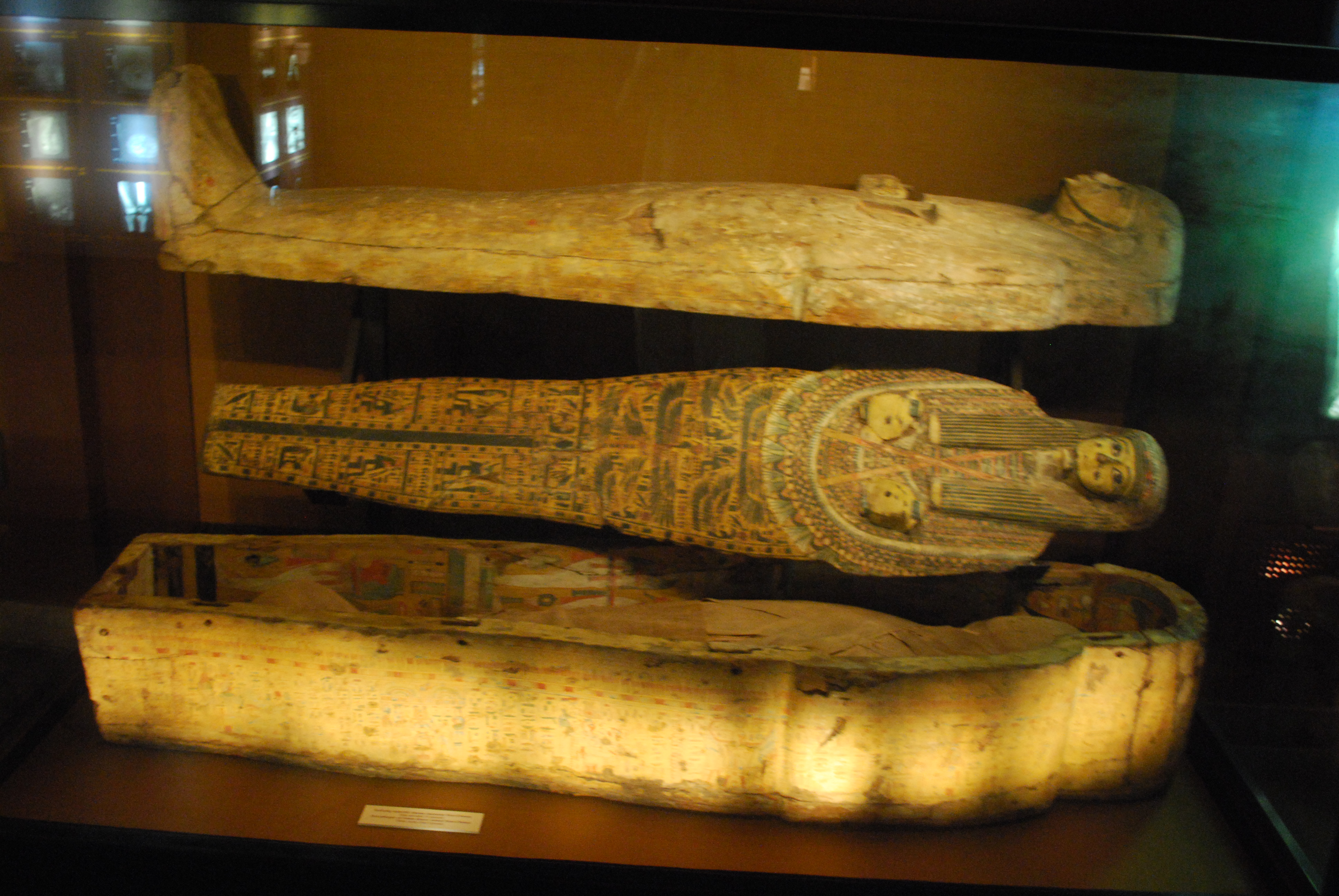 Ekspozycja Muzeum Archeologicznego w Krakowie